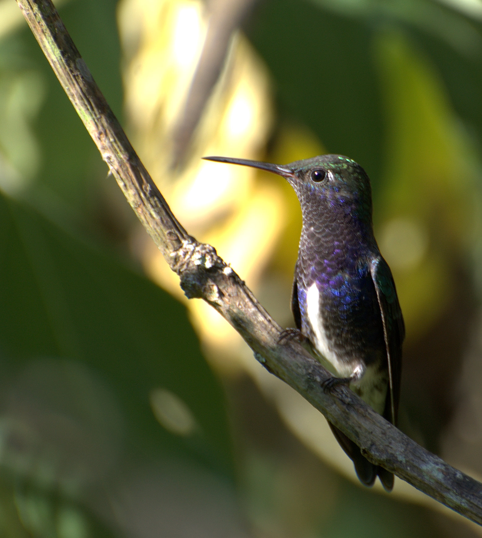 Amazilia lactea, Chácara Antonio Wuo, Mogi das Cruzes-SP (Brazil)